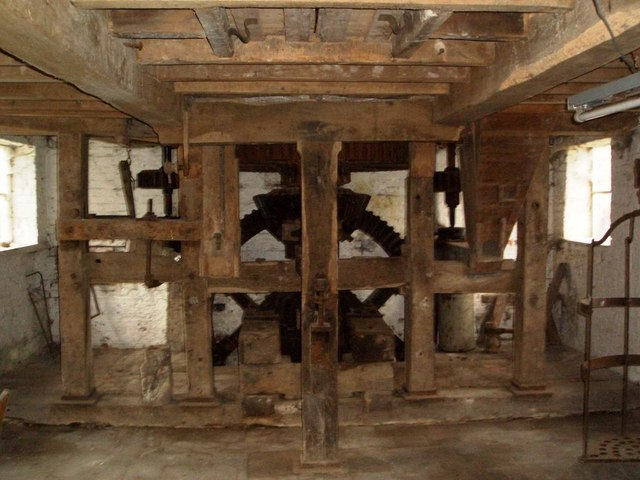 Trafford Mill